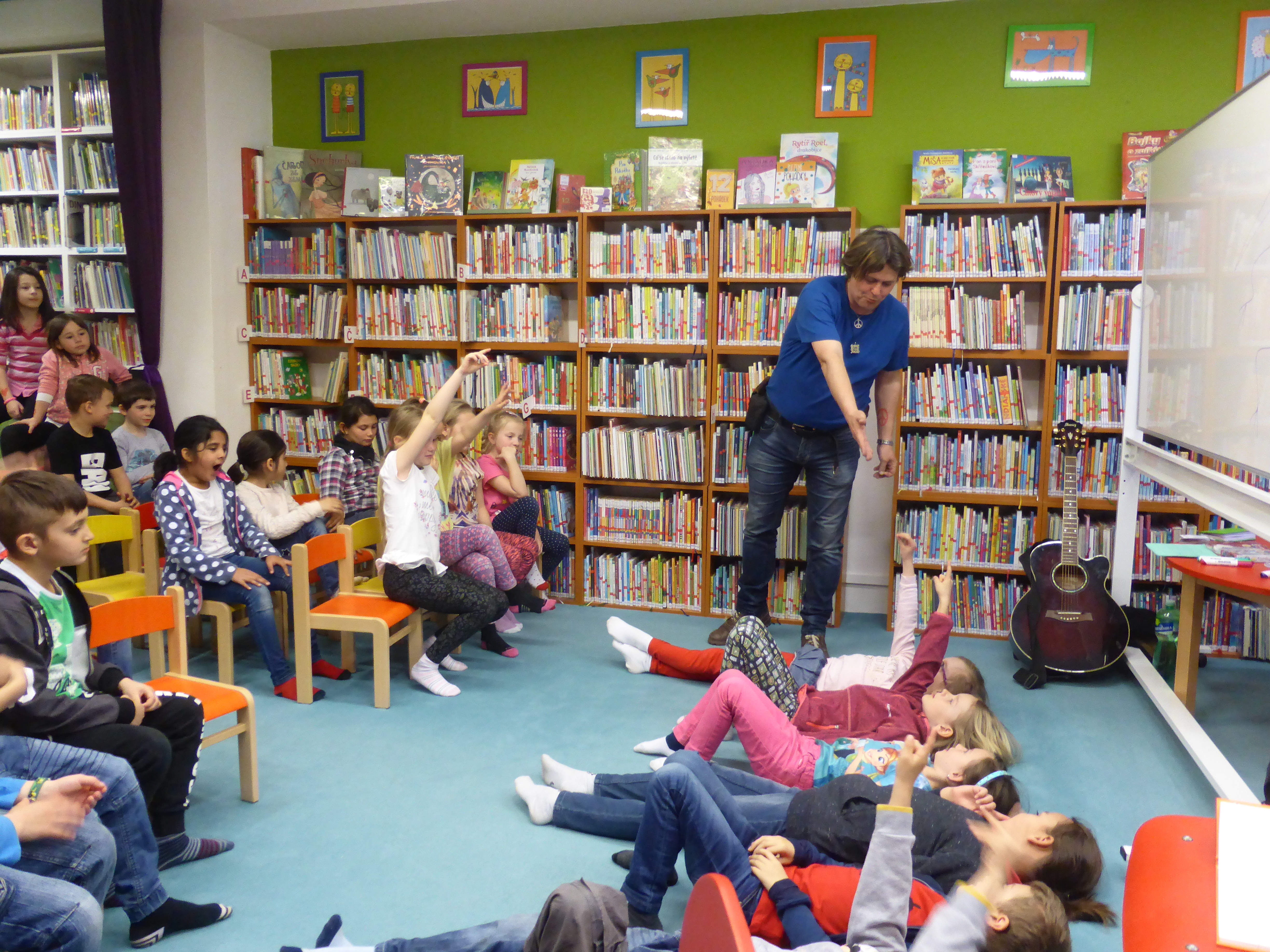 Marek Šolmes Srazil